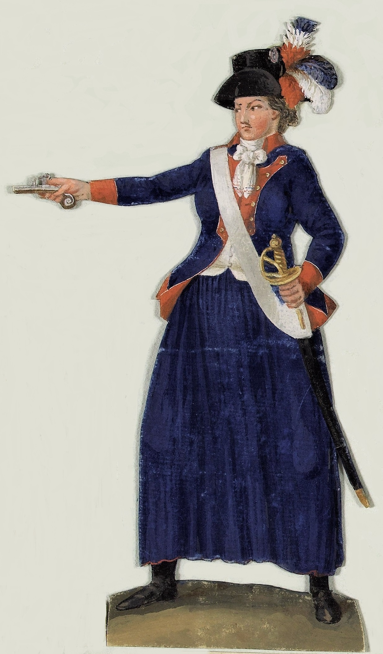 Théroigne de Méricourt. Détail d'une gouache des frères Lesueur, 1793-1795, Musée Carnavalet, Paris.